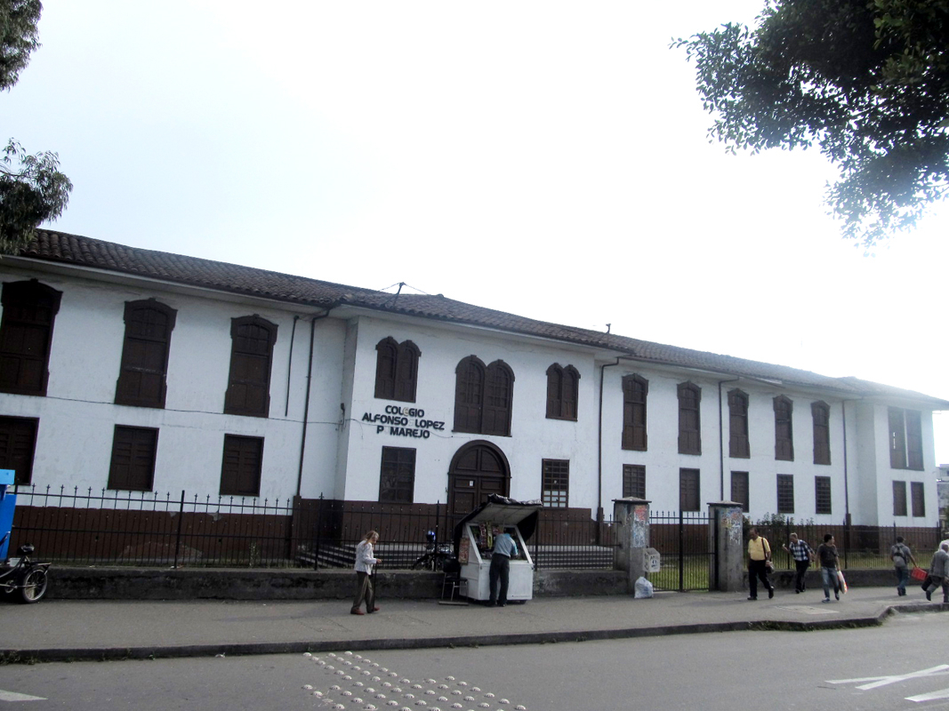 Concentración Escolar Juan XXIII